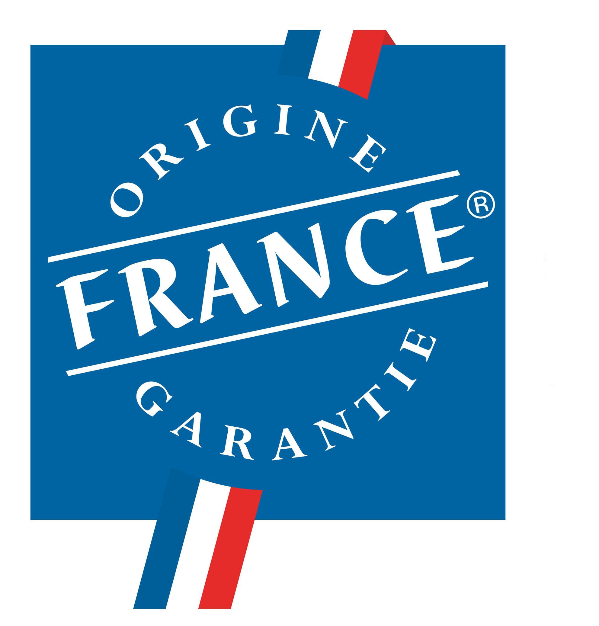 Le label Origine France Garantie assure aux consommateurs la traçabilité d'un produit en donnant une indication de provenance claire et objective.